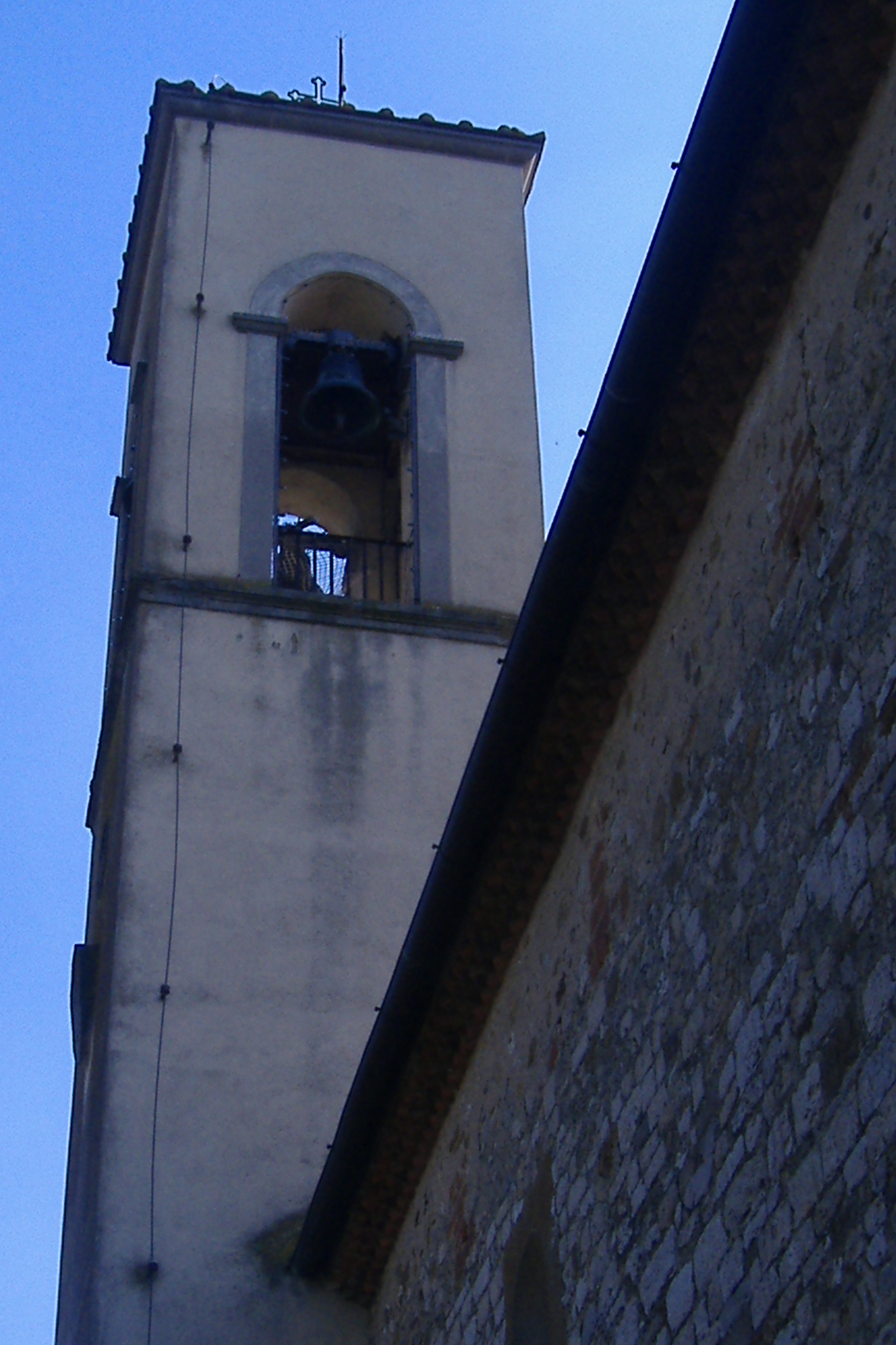 Stefano Nesti, Foto personale, Campanile della chiesa di Santa Maria a Quarto, Bagno a Ripoli, Marzo 2007. Disponibilità a rivedere in senso meno restrittivo i diritti che per il momento mi sono un po' oscuri...